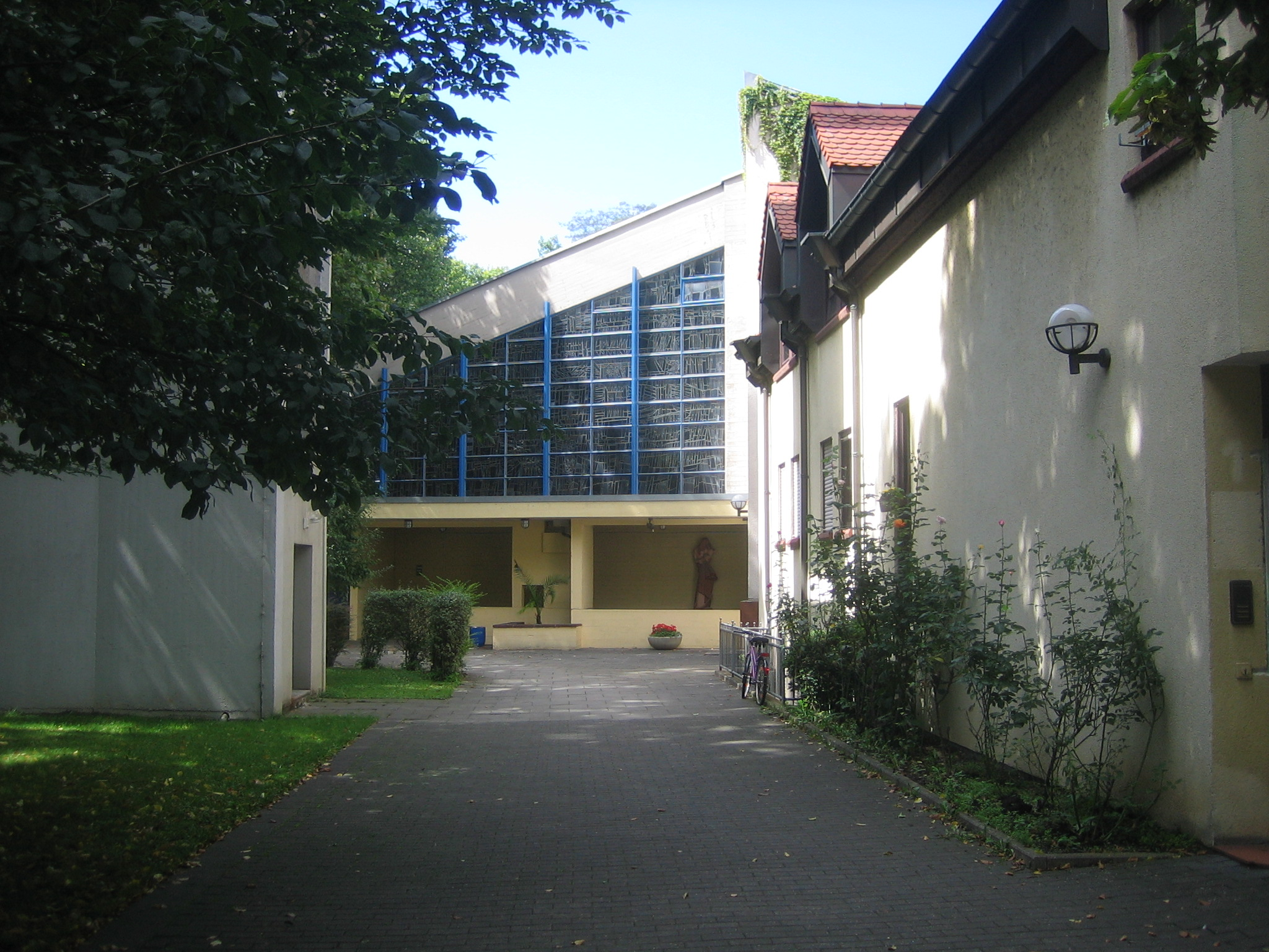 Südöstlicher Haupteingang der Pfarrkirche Liebfrauen in der Mainzer Neustadt. Links der Campanile rechts das Gemeindehaus.